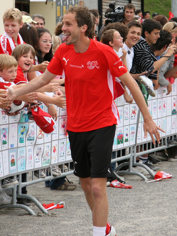 Patrick Müller im Trainingslager der Schweizer Fussballnationalmannschaft vor der Euro 2008